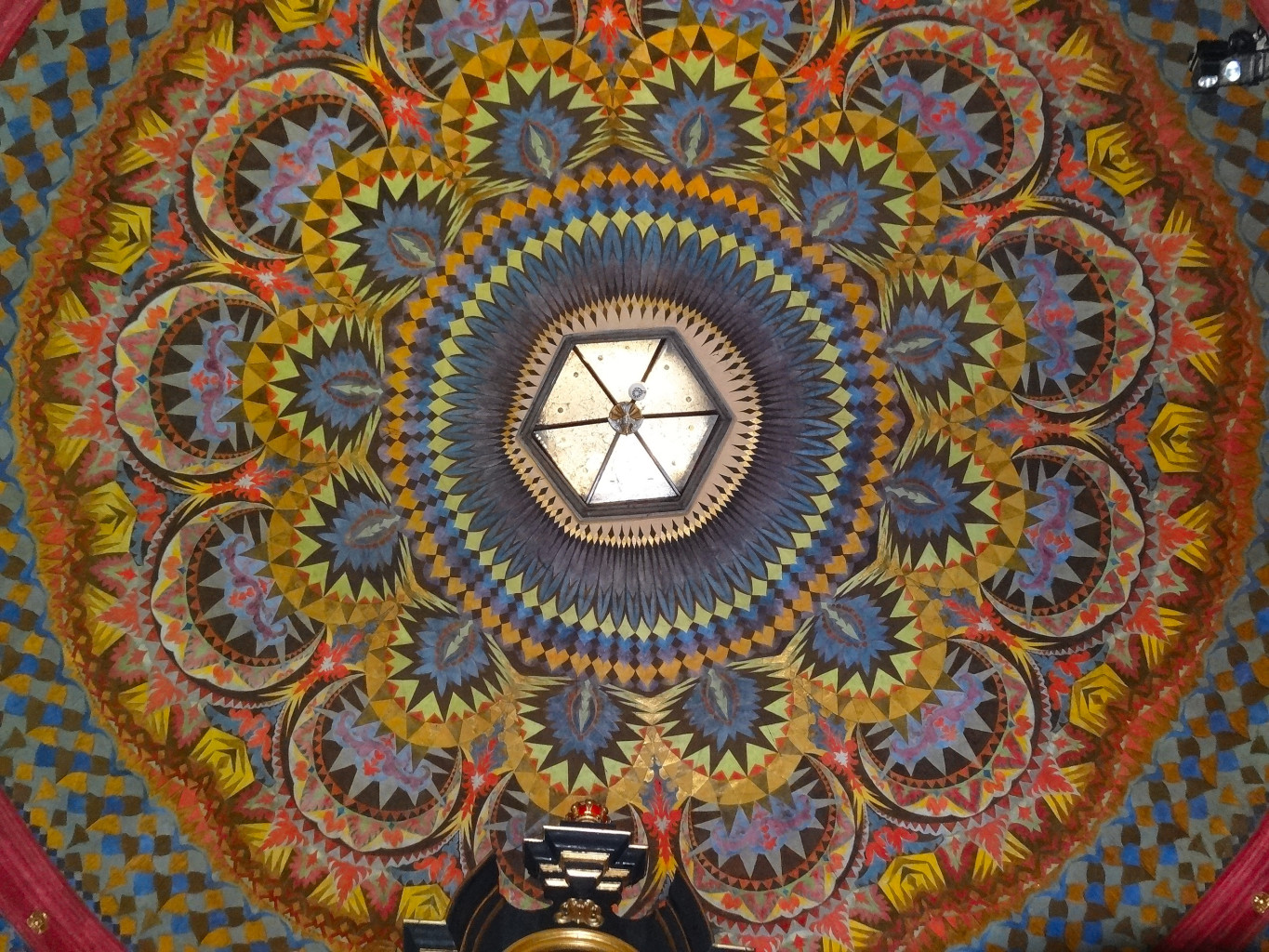 Sklepienia katedry w Bydgoszczy. Modernistyczna polichromia wykonana w latach 1922-1925 przez Henryka Jackowskiego wg projektu Stefana Cybichowskiego.